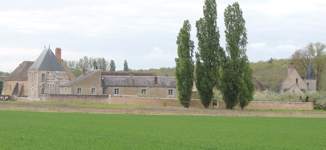 Manoir de Saveuse à Mémillon, St Maur sur le Loir avec degauche à droite: la grange de la ferme, la tour XVIIe, mur aux arches de plein ceintre pour l'accès au milieu, la deuxième tour d'angle tronquée et le corps de logis XVe s avec sa tour à droite